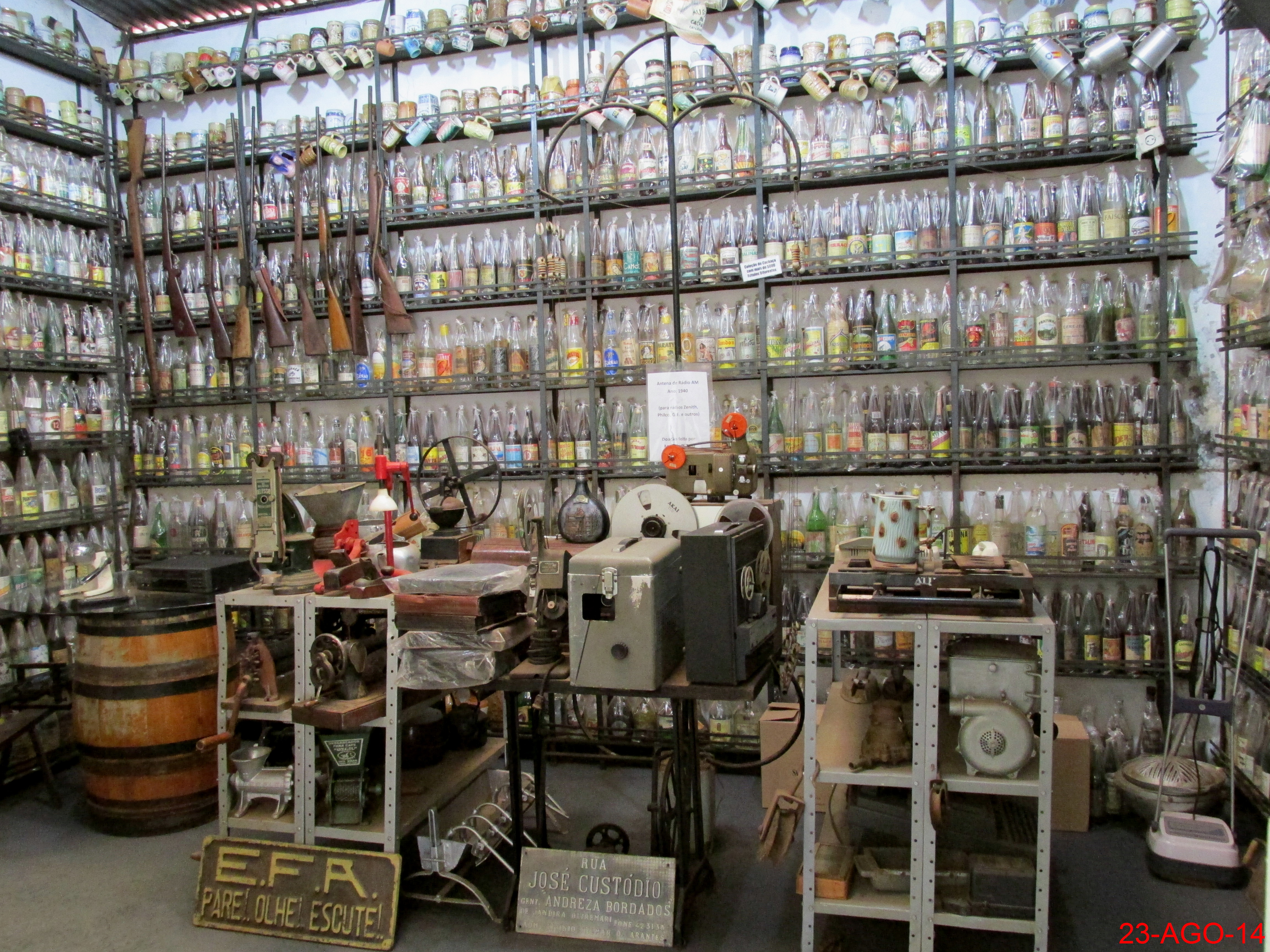 Entrada do antiquário no Engenho Santo Mario em Catanduva/SP. O Museu da Cachaça, anexo ao Engenho, com mais de 5000 garrafas da bebida e um pequeno acervo de antiguidades em exposição.